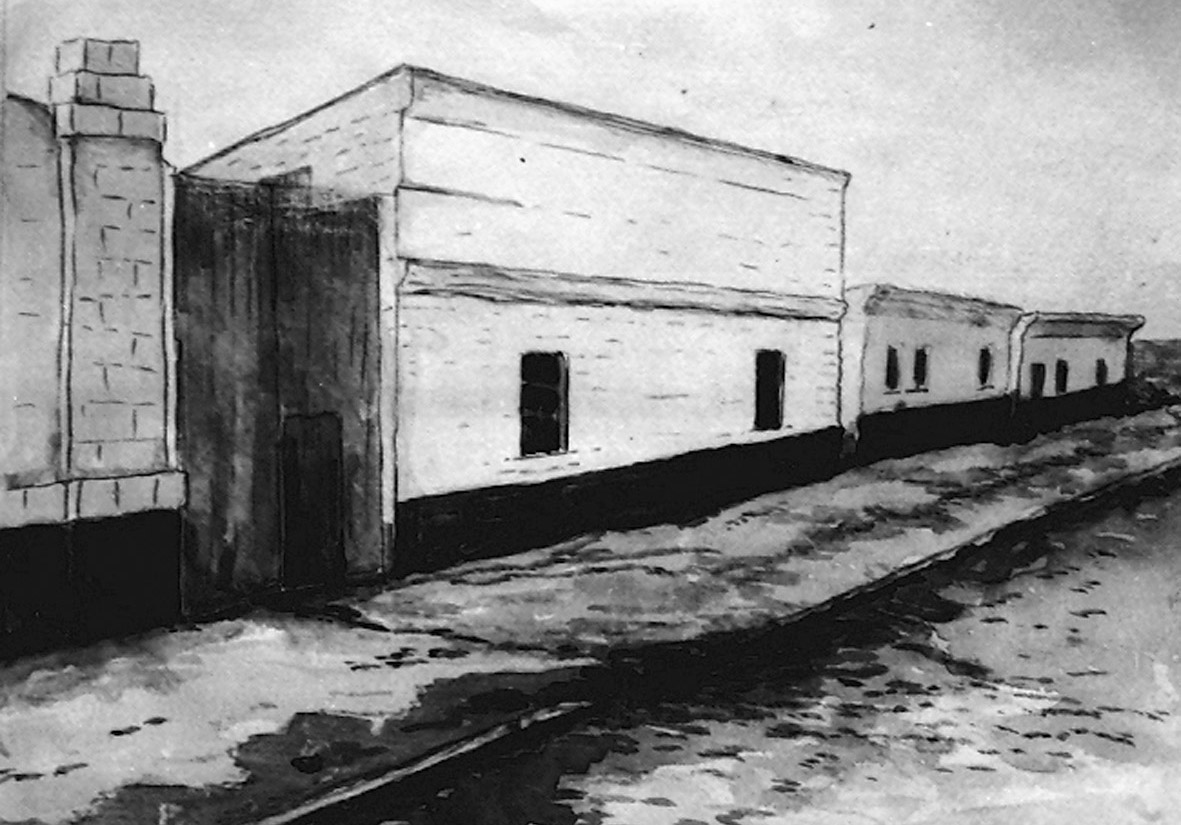 Перше зібрання на Слобідці: Перше зібрання на Слобідці